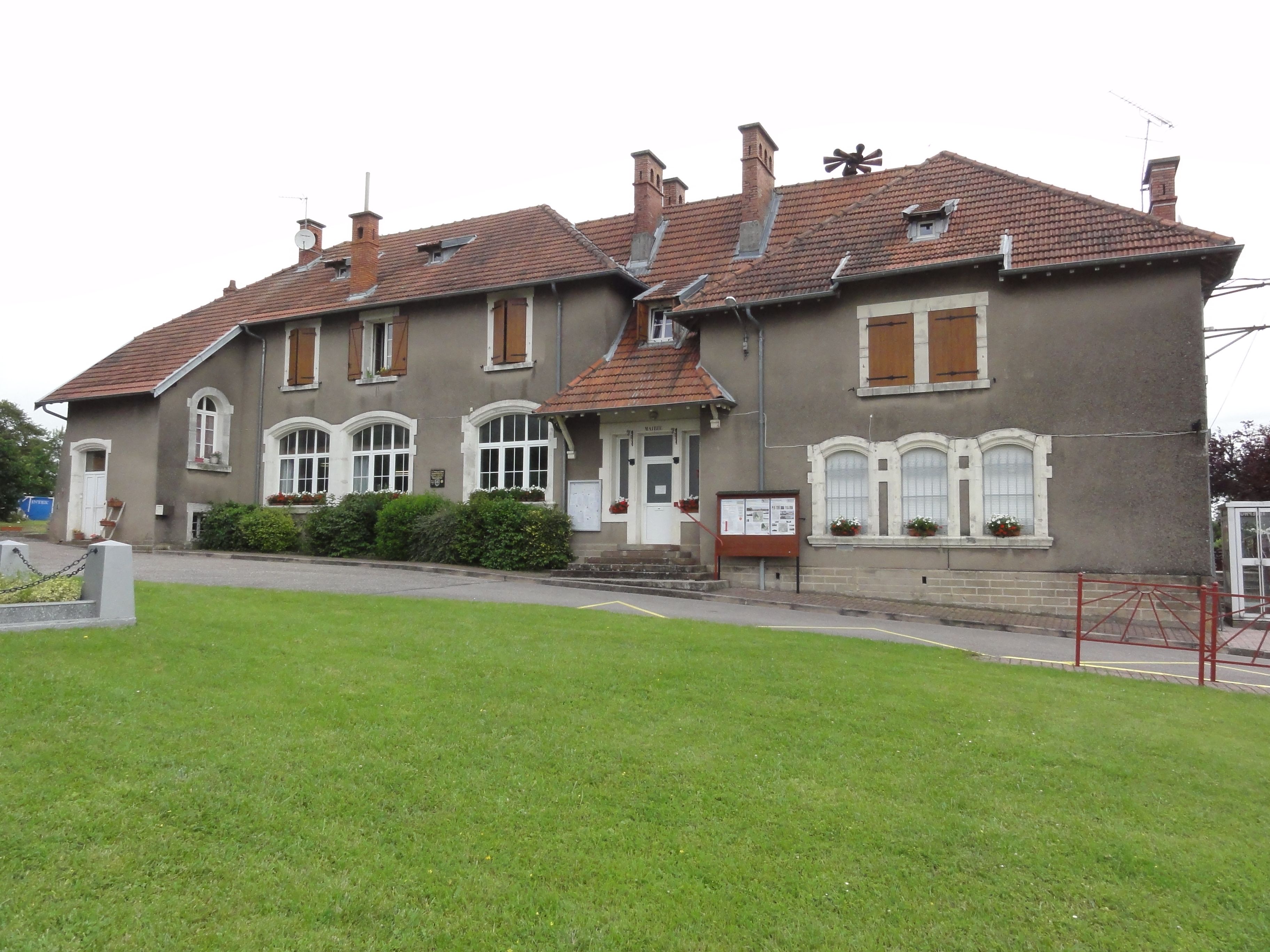 Emberménil (M-et-M) mairie